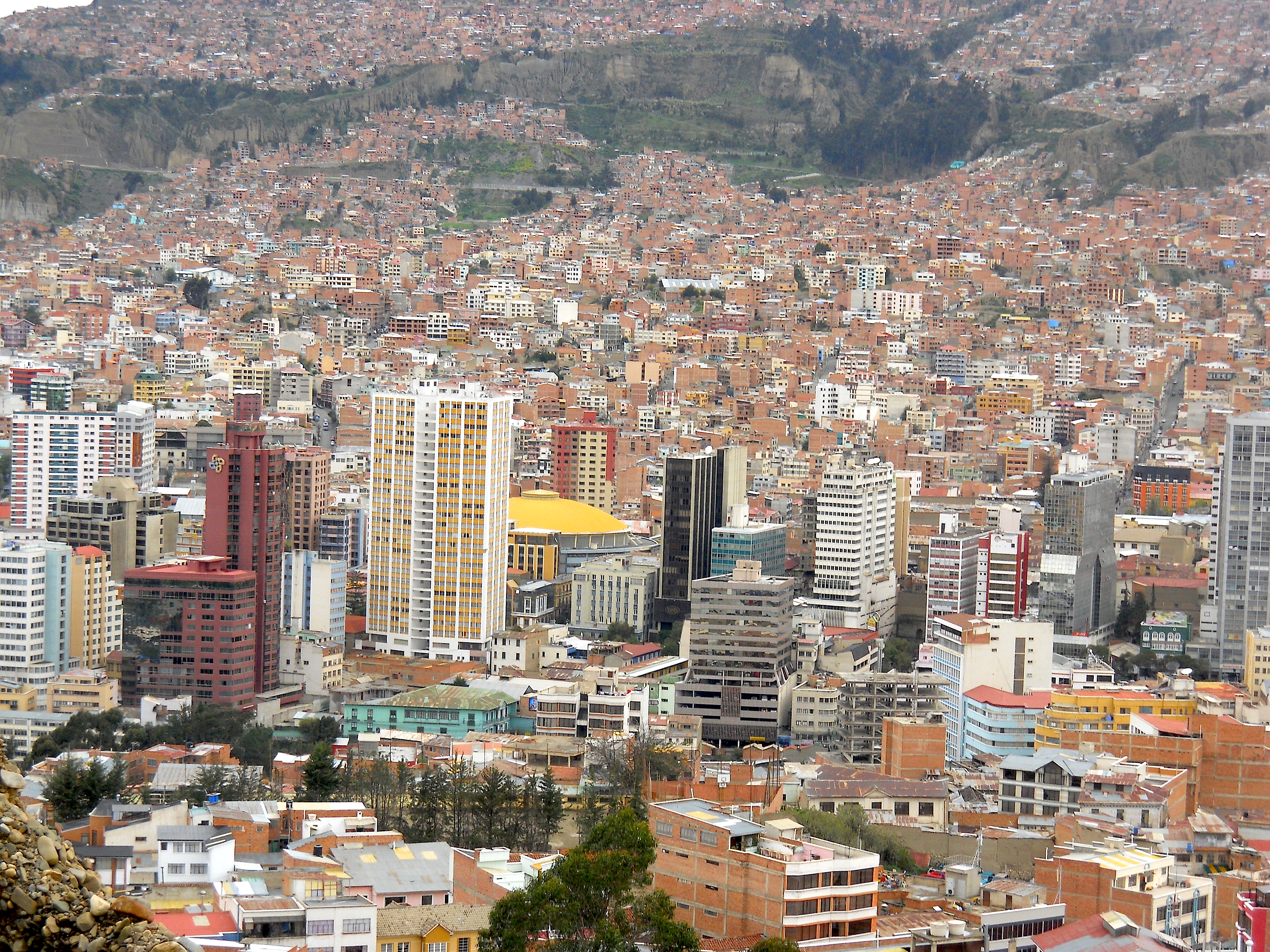 La Paz, Bolivia